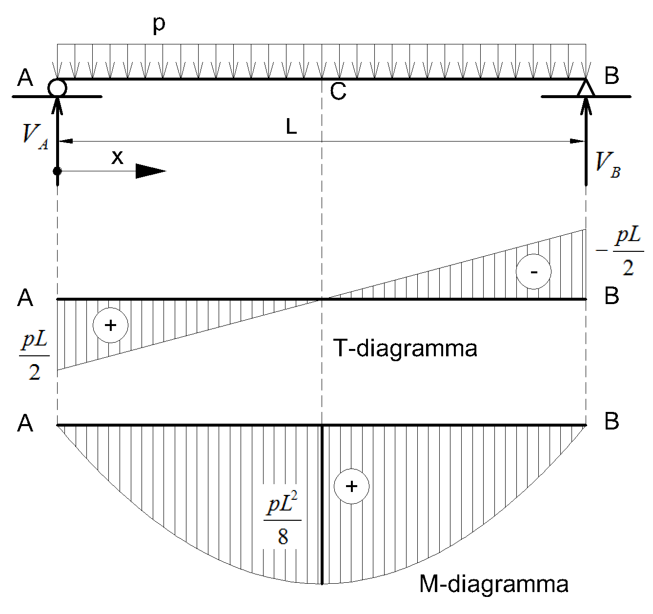 balk met gelijk verdeelde last